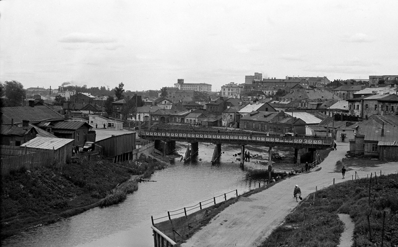 Вуліца Гандлёвая ў 1950-я гады